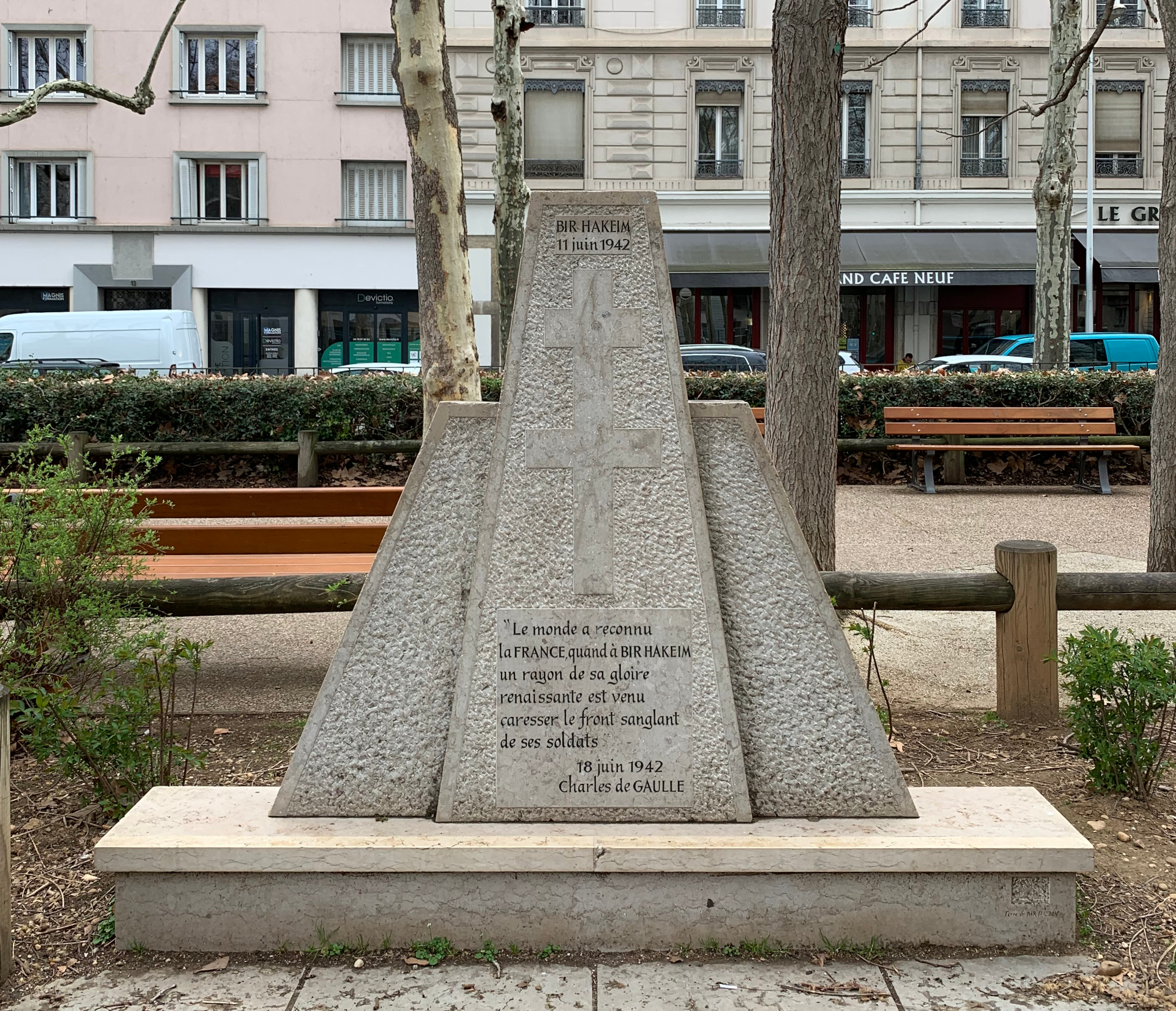 Stèle commémorative place Bir Hakeim (Lyon). recto in engraving: Le monde a reconnu La France quand à BIR HAKEIM Un rayon de sa gloire renaissante est venu Caresser le front sanglant De ses soldats 18 juin 1942 Charles de Gaulle